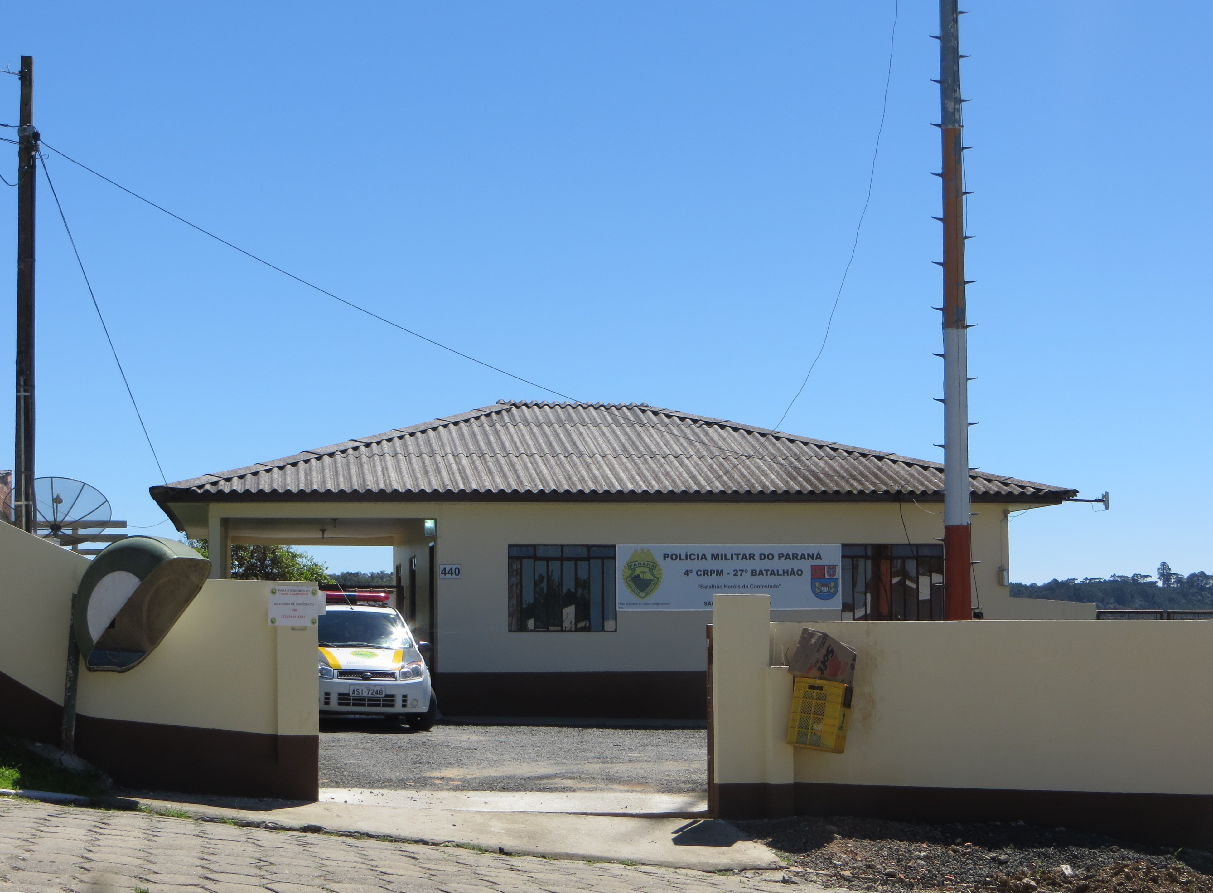 Destacamento da Polícia Militar em São Mateus do Sul, estado brasileiro do Paraná, região sul do Brasil